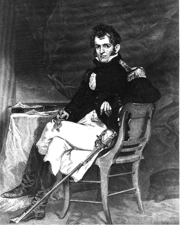 中文（中国大陆）: 美国海军准将大卫·波特肖像